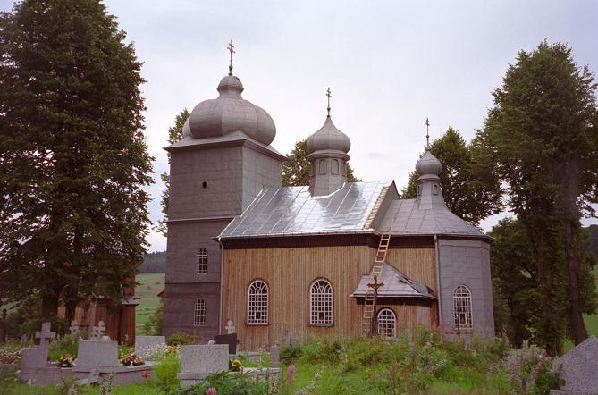 Cerkiew w Koniecznej